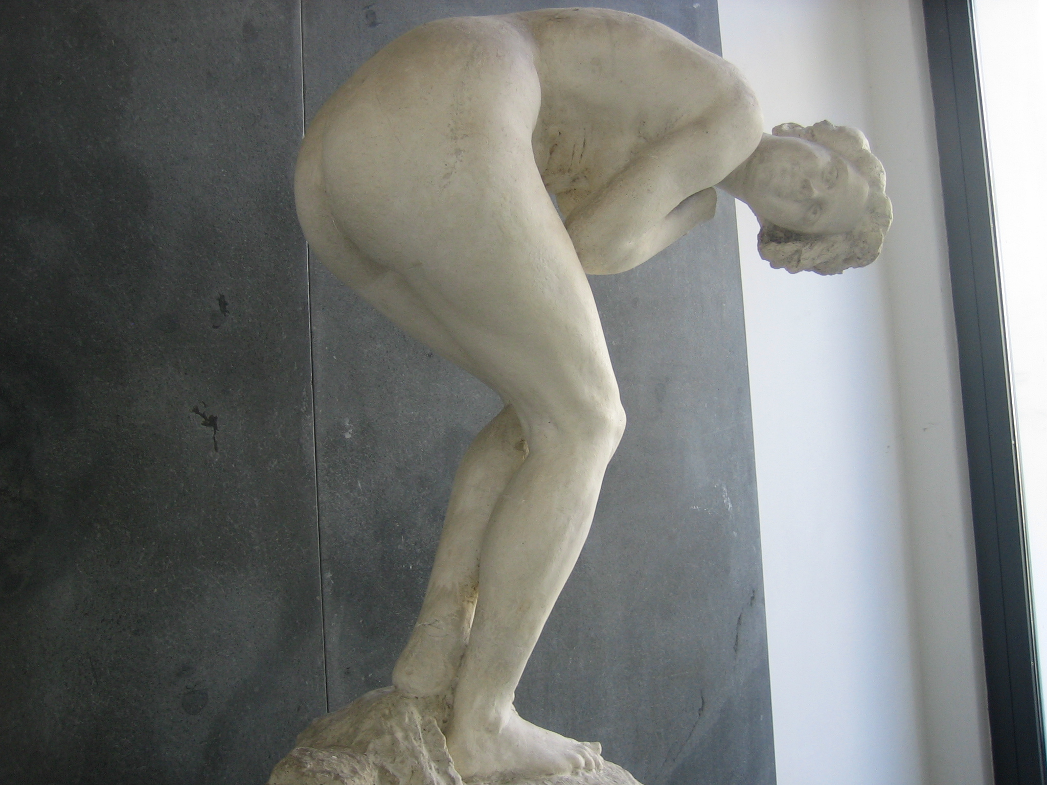 La Giumenta dello scultore calabrese Giuseppe Renda (Polistena, 1859 – Napoli, 1939), oggi al Museo di San Martino a Napoli